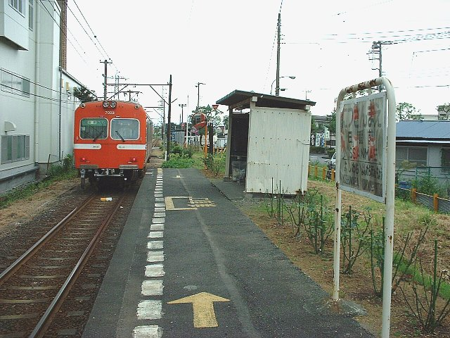 岳南鉄道・日産前駅（撮影当時の名称。現・ジヤトコ前駅）構内